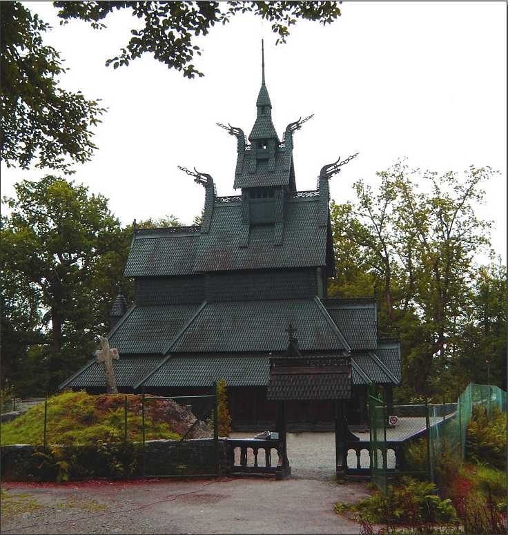 L'église en bois debout de Fantoft située dans la vallée de Bergen, ici après sa reconstruction en 1997.